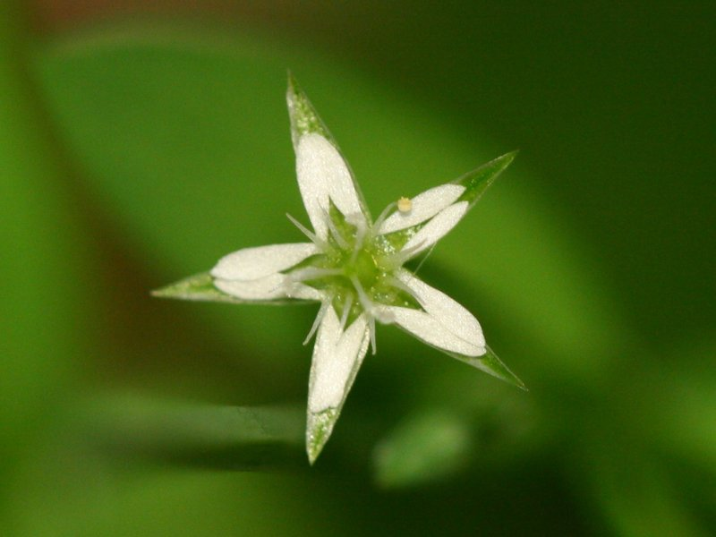 Bach-Sternmiere (Stellaria alsine)